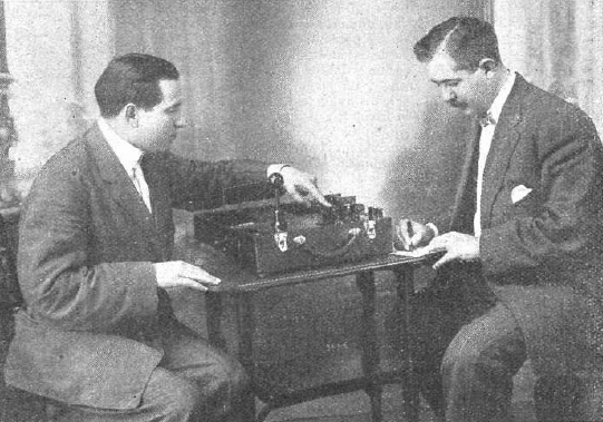 Fotografía del inventor español Mónico Sánchez Moreno en la que se le ve mostrando su aparato portátil de rayos X a un medico portorriqueño